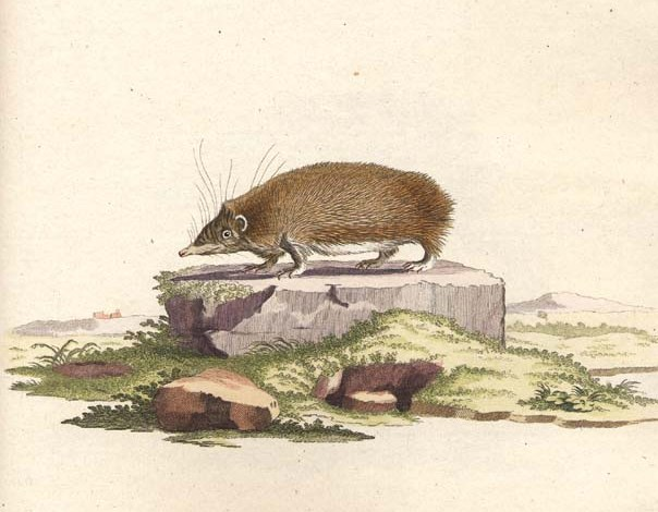 Setifer setosus, plate from Schreber, Johann Christian Daniel von, Histoire naturelle des quadrupèdes représentés d´après nature. Tome III. Le phoque, le chien, le chat, le putois, la loutre, la marte, l'ours, le didelphe, la taupe, la souris, le hérisson A Erlang, chez Wolfgang Walther, 1780